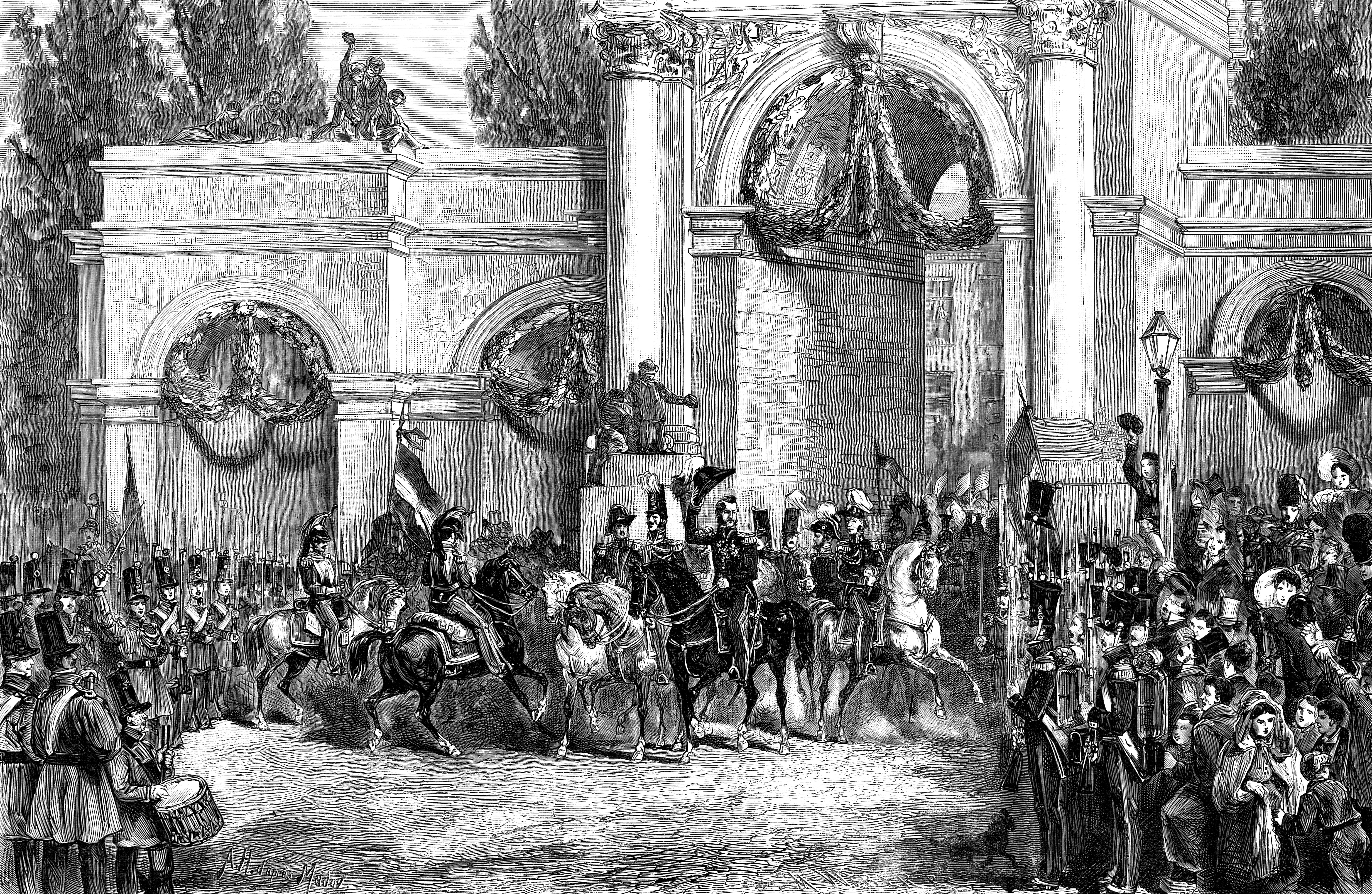 Entrée de Léopold Ier à Bruxelles le jour de son avènement, le 21 juillet 1831.